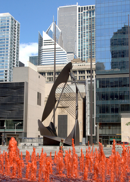 daley plaza